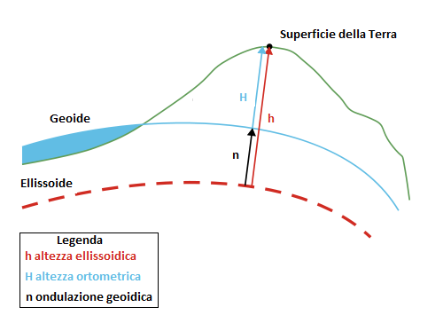 Altezza ortometrica, ellissoidica, e ondulazione del Geoide